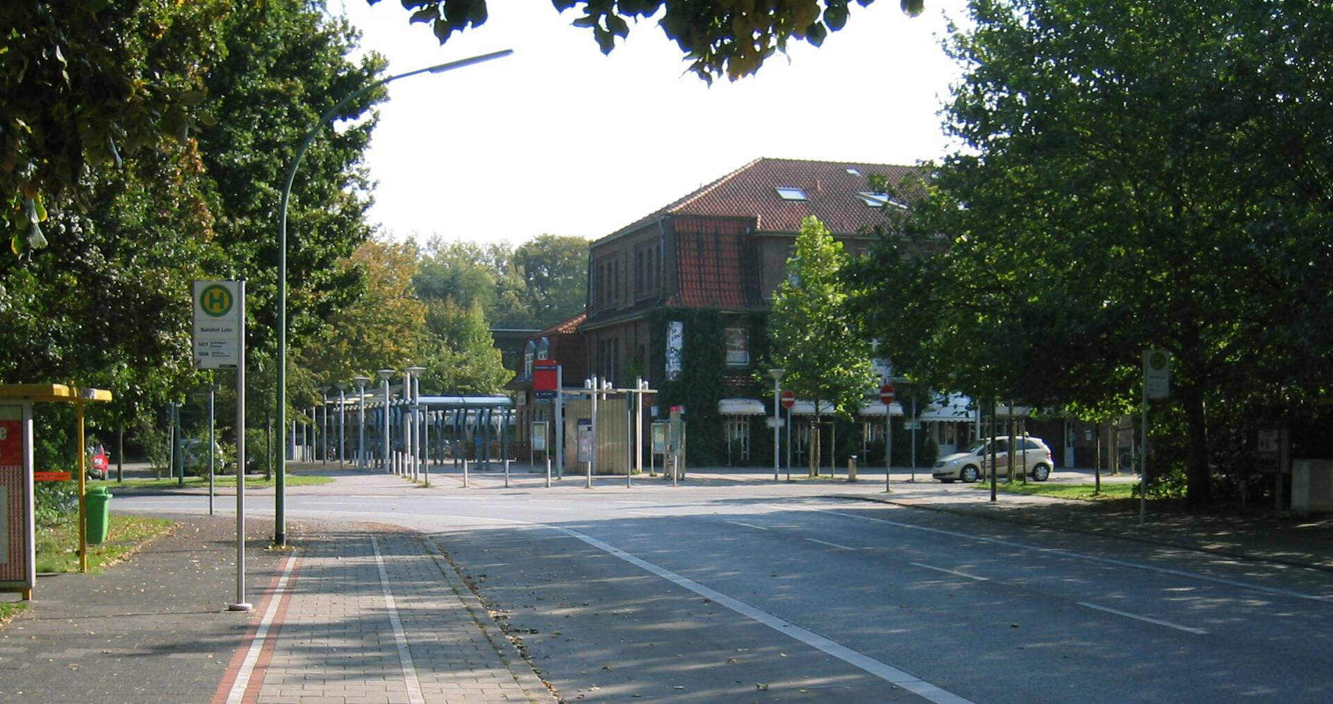 Lehe: Bahnhof Bremerhaven-Lehe, heutiger Zugang zum Gleis neben Bahnhofsgebäude